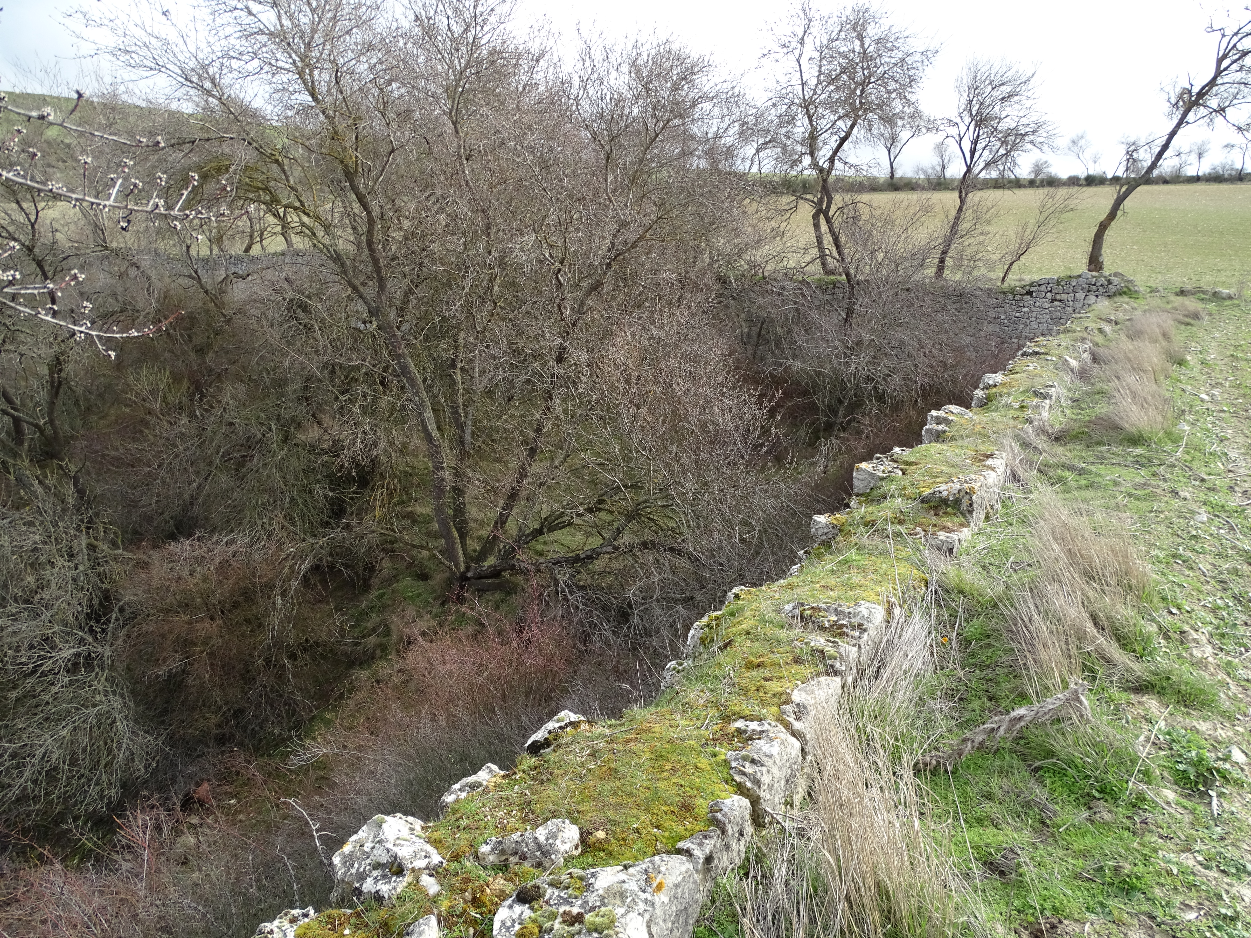 Monasterio de Valdescopezo en el término de Medina de Rioseco (Valladolid, España), en los montes Torozos. Muro que rodeaba el recinto del monasterio. Patrimonio desaparecido.